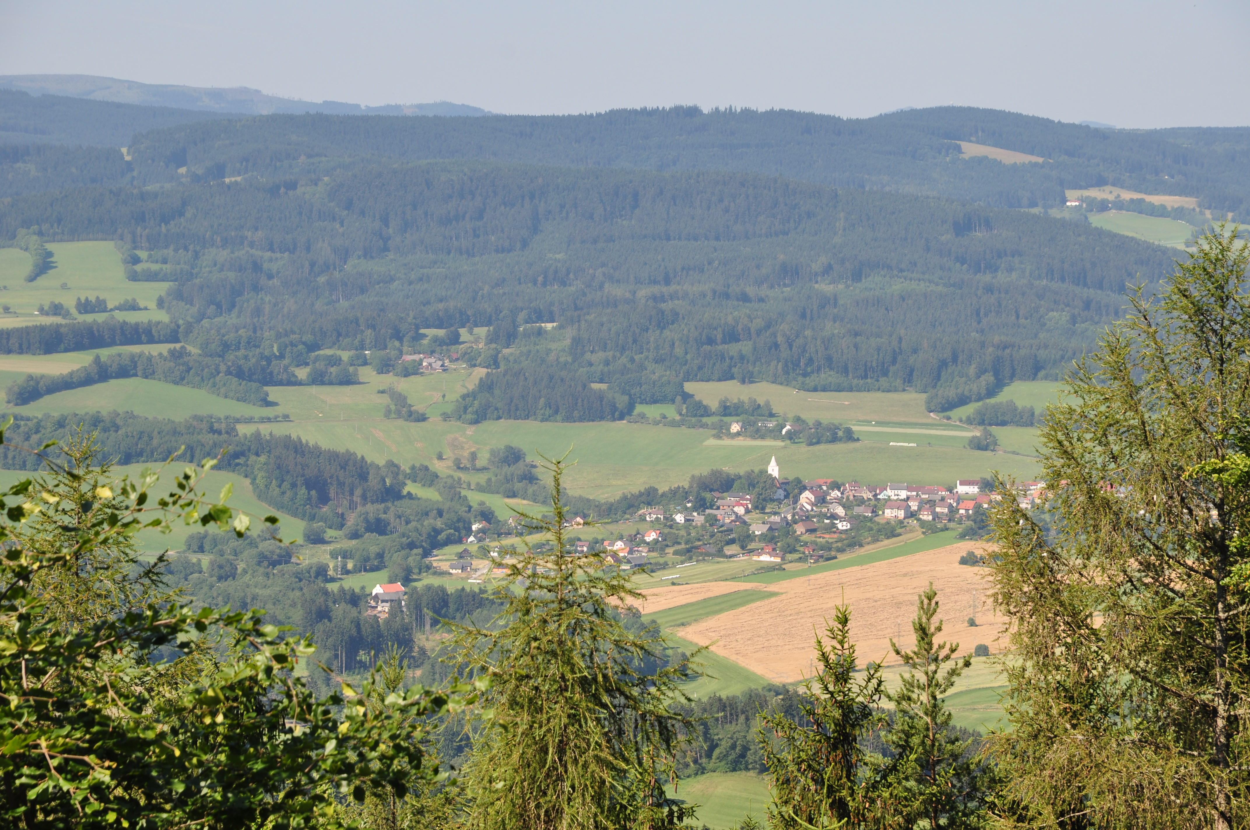 PŘP Kochánov